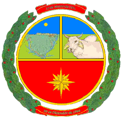 Escudo de Armas del Municipio Rómulo Gallegos (Las Vegas), Estado Cojedes, Venezuela